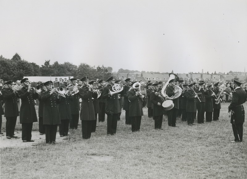 De marinekapel onder leiding van kapelmeester L.H.F. Leistikow speelt tijdens de vlaggenparade op het Molenveld op de maandagmiddag voor de 27e Vierdaagse.